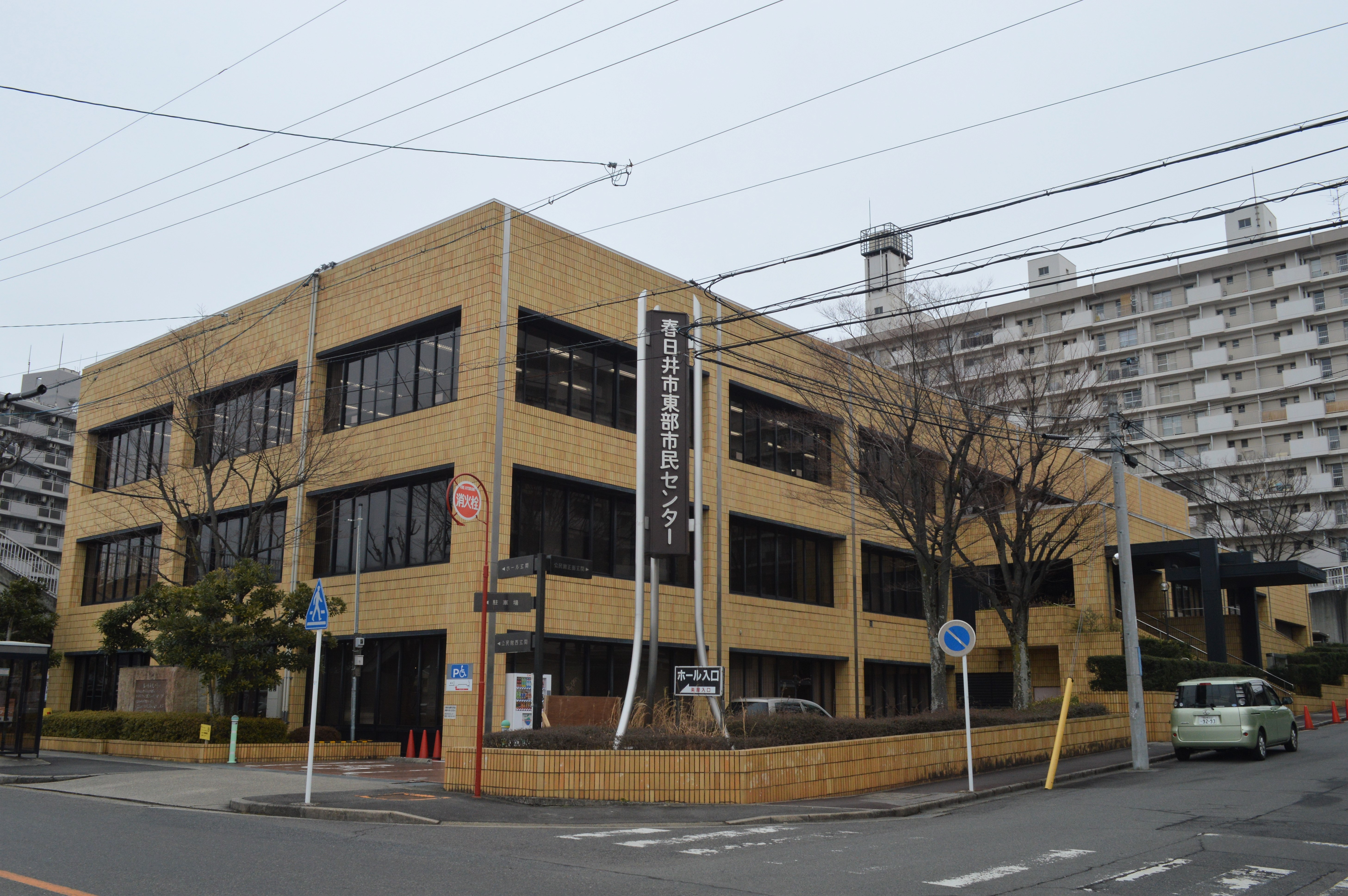 愛知県春日井市の春日井市東部市民センター。